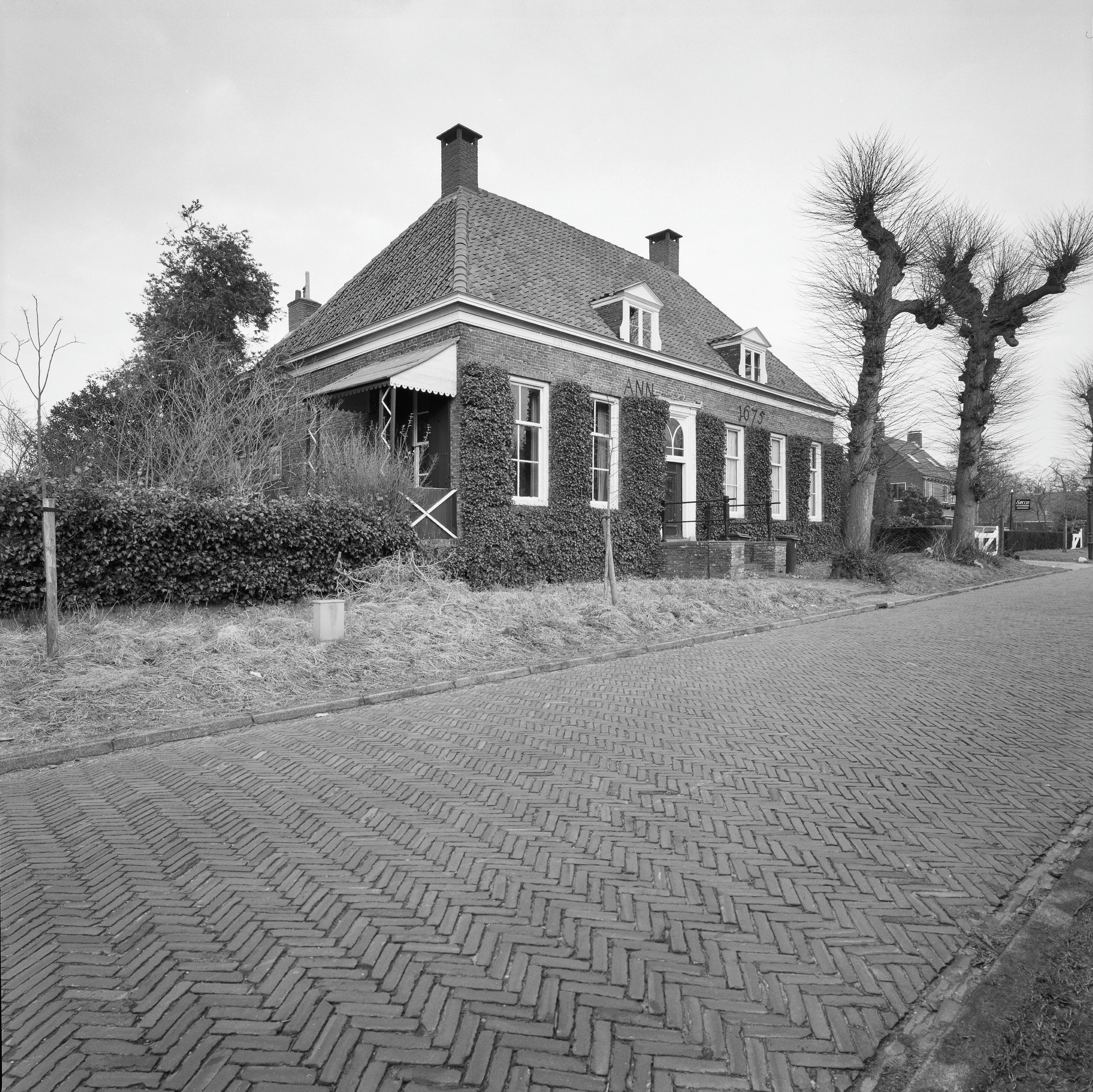 Drostehuis: Exterieur OVERZICHT, VOORGEVEL, LINKER ZIJGEVEL